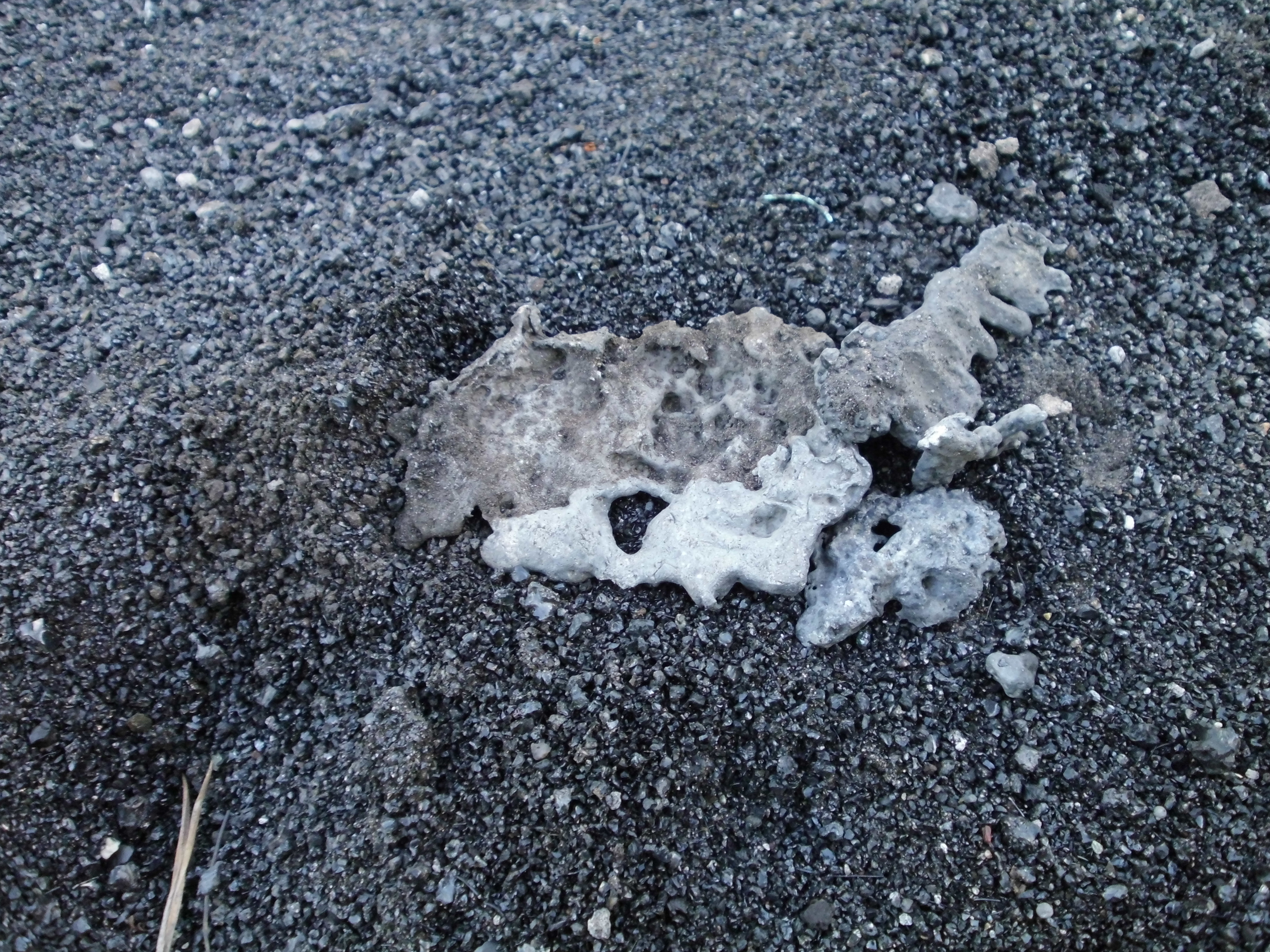 Шлаковые отвалы производства никеля на комбинате в г. Верхнем Уфалее. Слитки мягкого металла, серебристого на изломе.